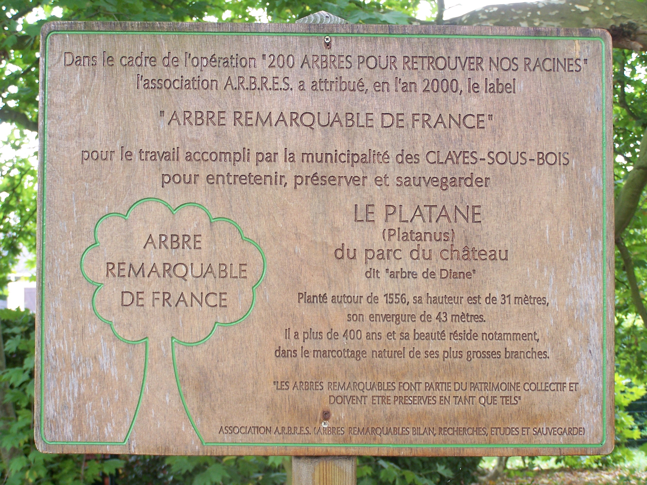 Arbre de Diane aux Clayes-sous-Bois (Yvelines, France). Photo personnelle Arbre de Diane (Diane's tree) in Les Clayes-sous-Bois (Yvelines, France). Personal picture. Panneau d'information. Ce platane aurait été planté vers 1556 pour Diane de Poitiers. Information notice. This plane tree is said to have been planted in 1556 for Diane de Poitiers. Auteur/Author : ℍenry Salomé